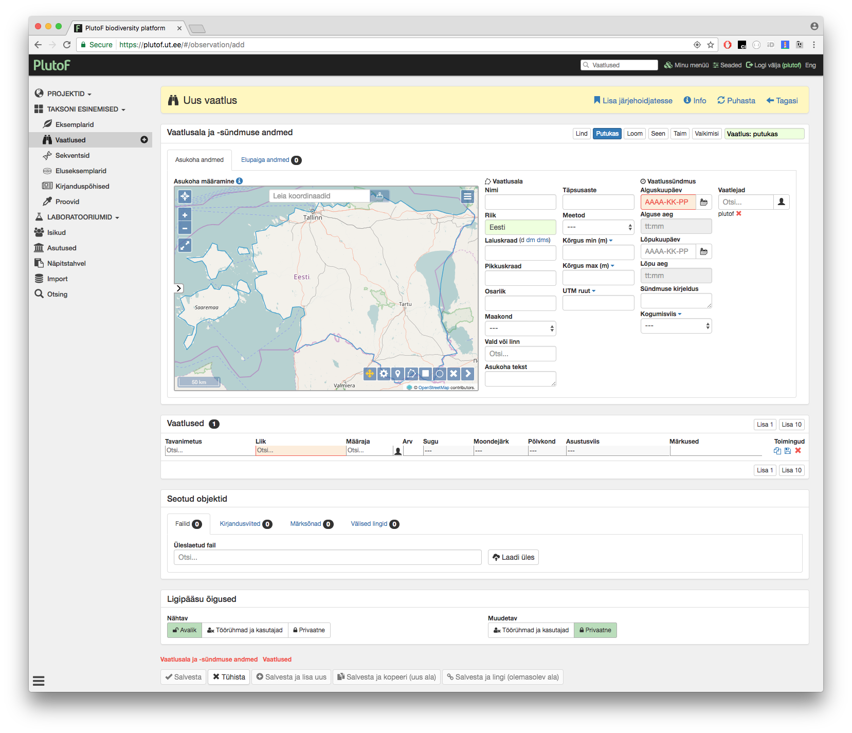 PlutoF sisestusvorm